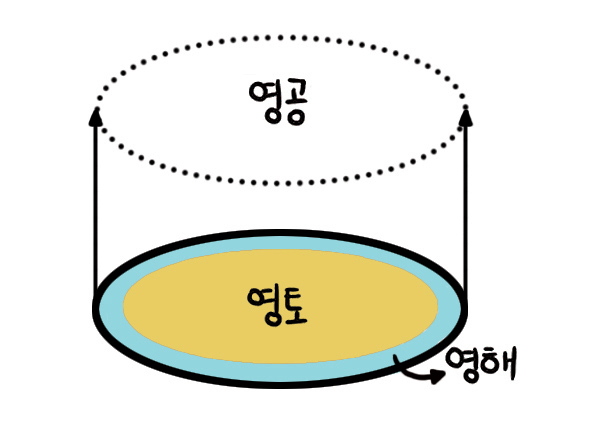 영토와 영해의 상공인 영공의 범위를 나타낸 그림